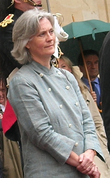 Penelope Fillon à la passation de pouvoir : François Fillon - Dominique de Villepin en mai 2007.